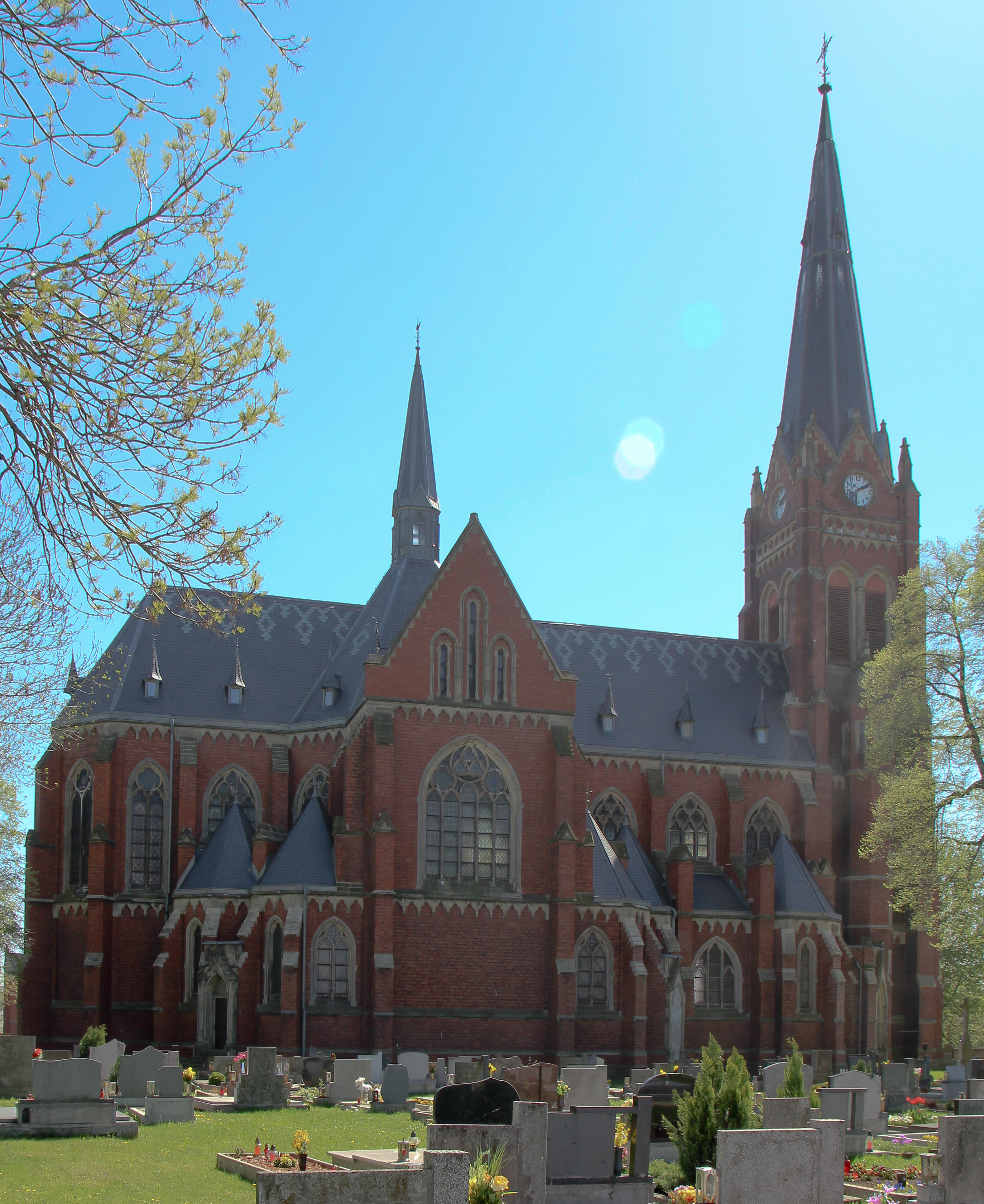 Sudice (Sudzice) - wieś gminna w Czechach, w powiecie opawskim.